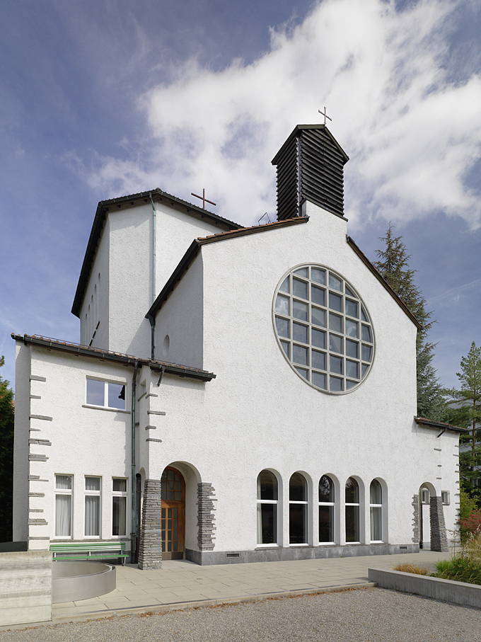 Römisch-katholische Kirche St. Martin, Zürich, Aussenaufnahme von hinten